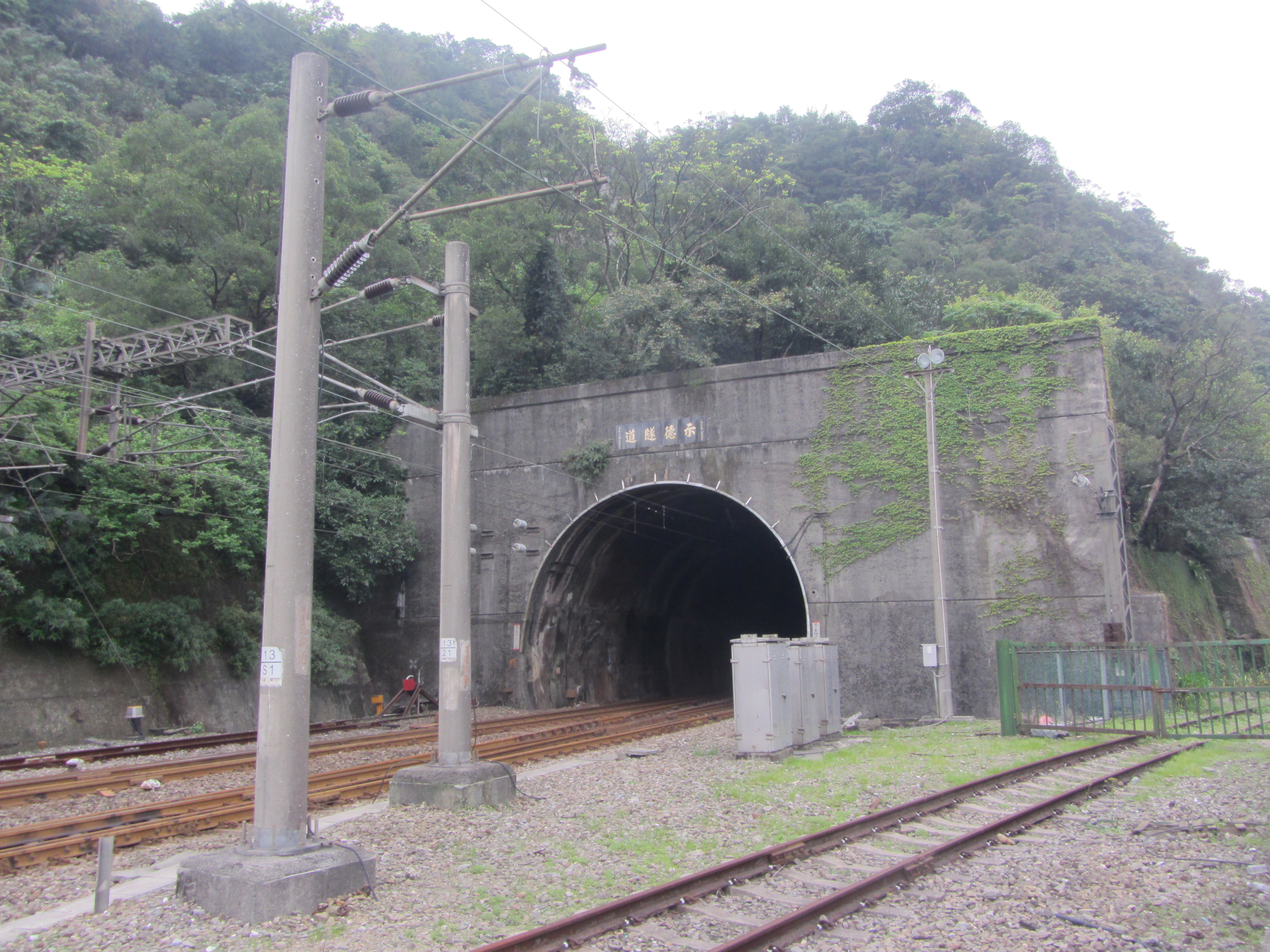 台灣鐵路管理局宜蘭線示德隧道東口